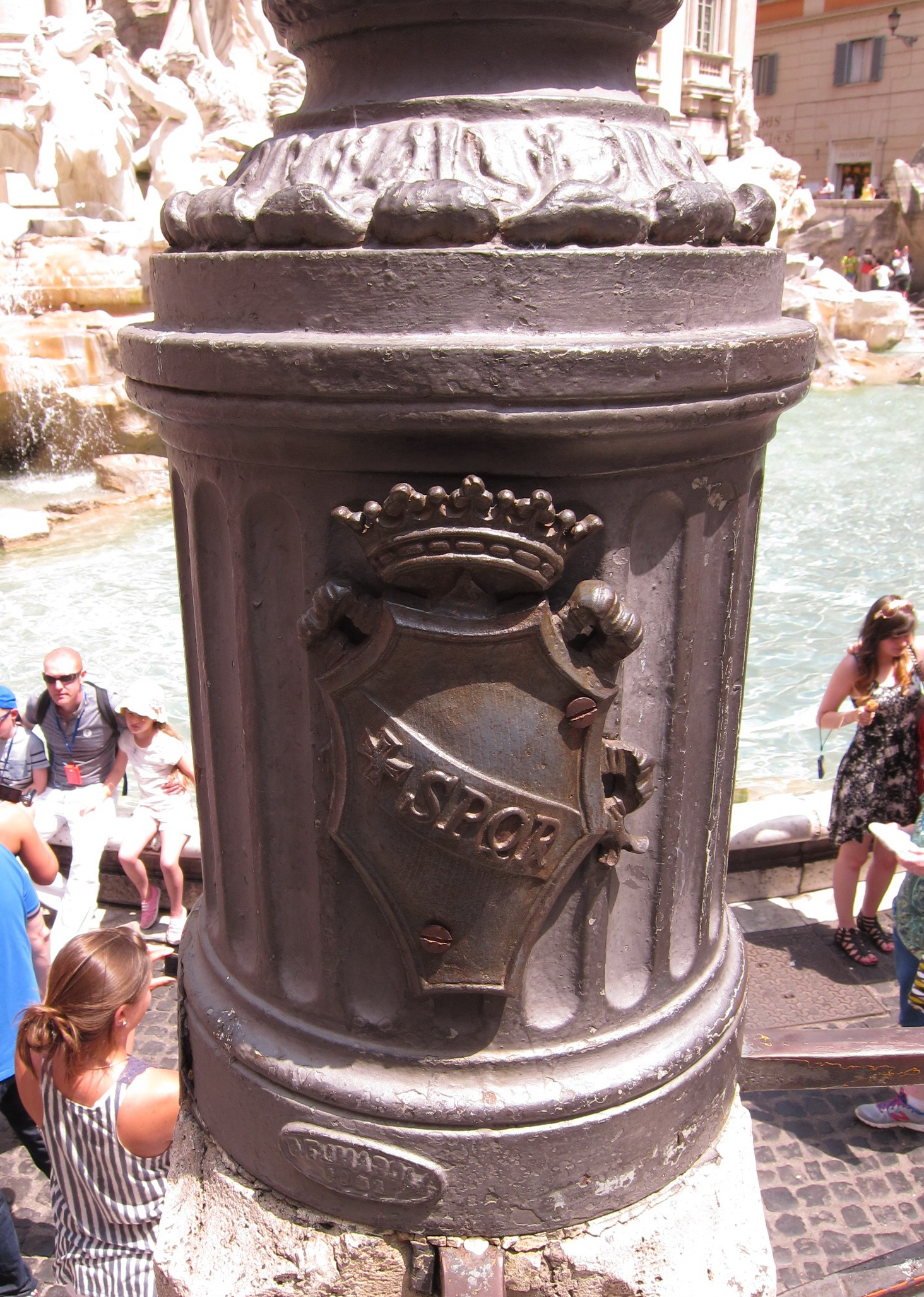 罗马特莱维喷泉旁刻有“SPQR”铭文的路灯柱。